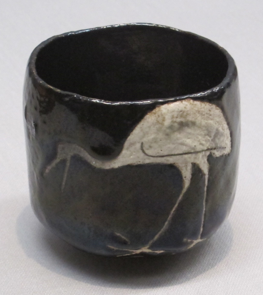 Periodo edo, bicchiere da te, di nin'ami dohachi, tipo kuroraku, XIX sec